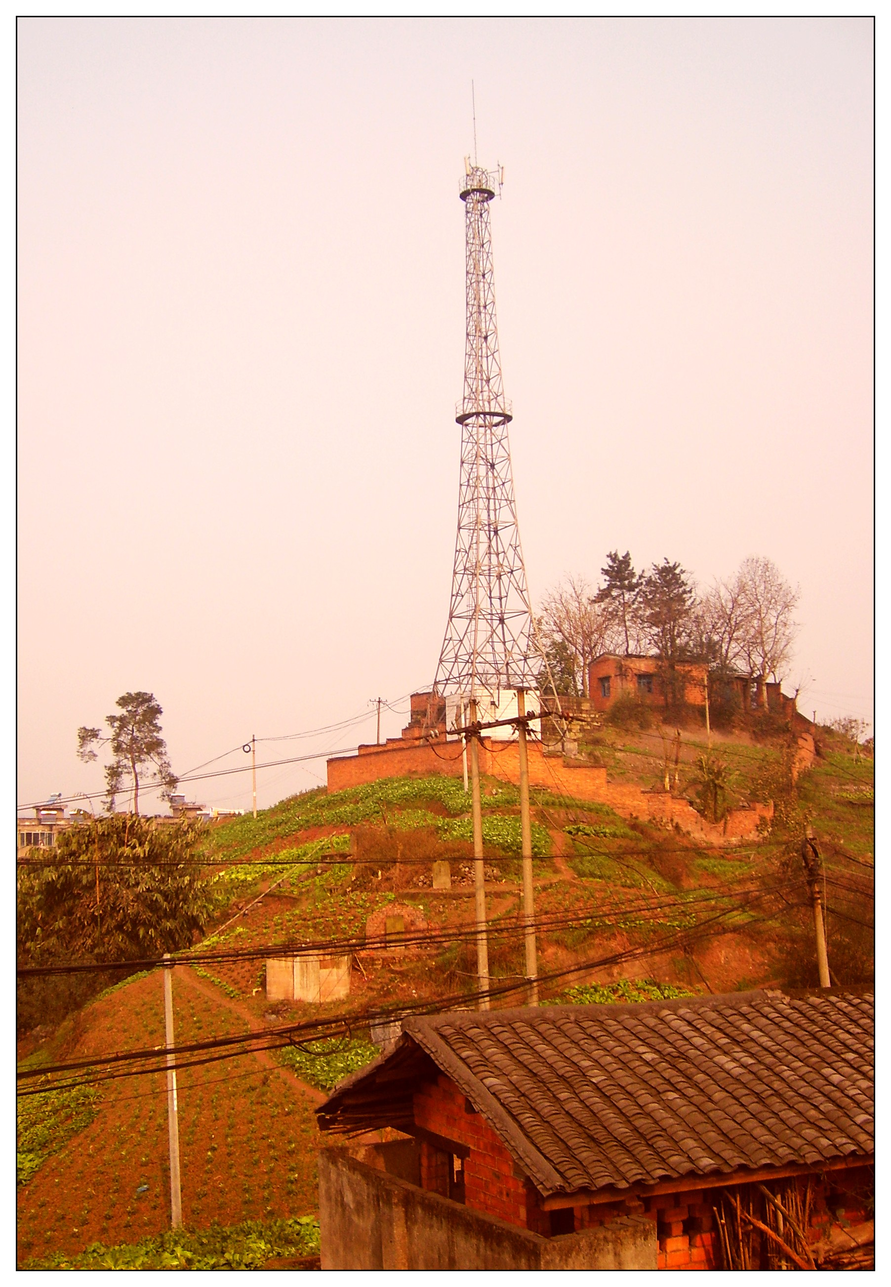 永川煤矿转移动信号基站